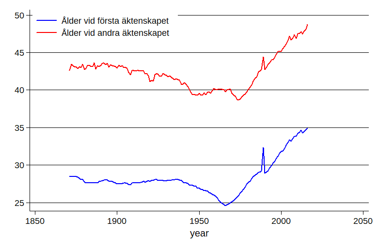 Genomsnittlig ålder vid äktenskap från 1871 till 2016. År 1990 avskaffades Änkepensionen i Sverige, vilket ledde till att många gifte sig precis innan avskaffandet.